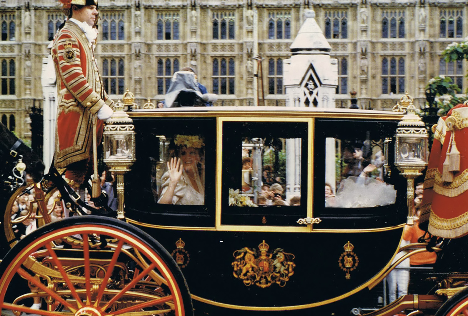 Korso anlässlich der Hochzeit von Andrew Mountbatten-Windsor, Duke of York, und Sarah Ferguson in London, Westminster. Hier: Sarah Ferguson vor der Hochzeitszeremonie